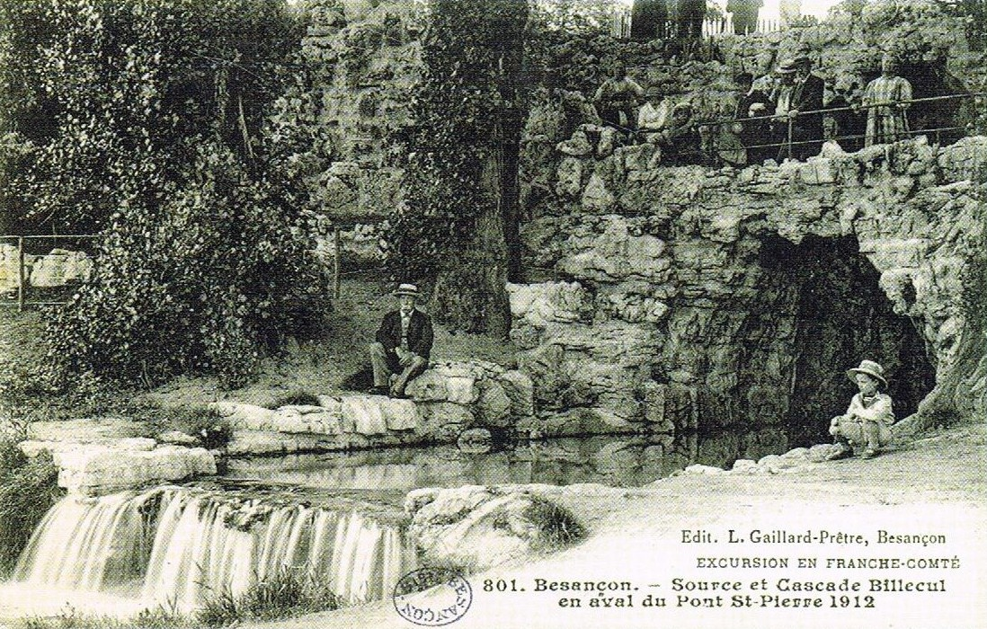 Source et cascade de Billecul à Besançon, en 1912.